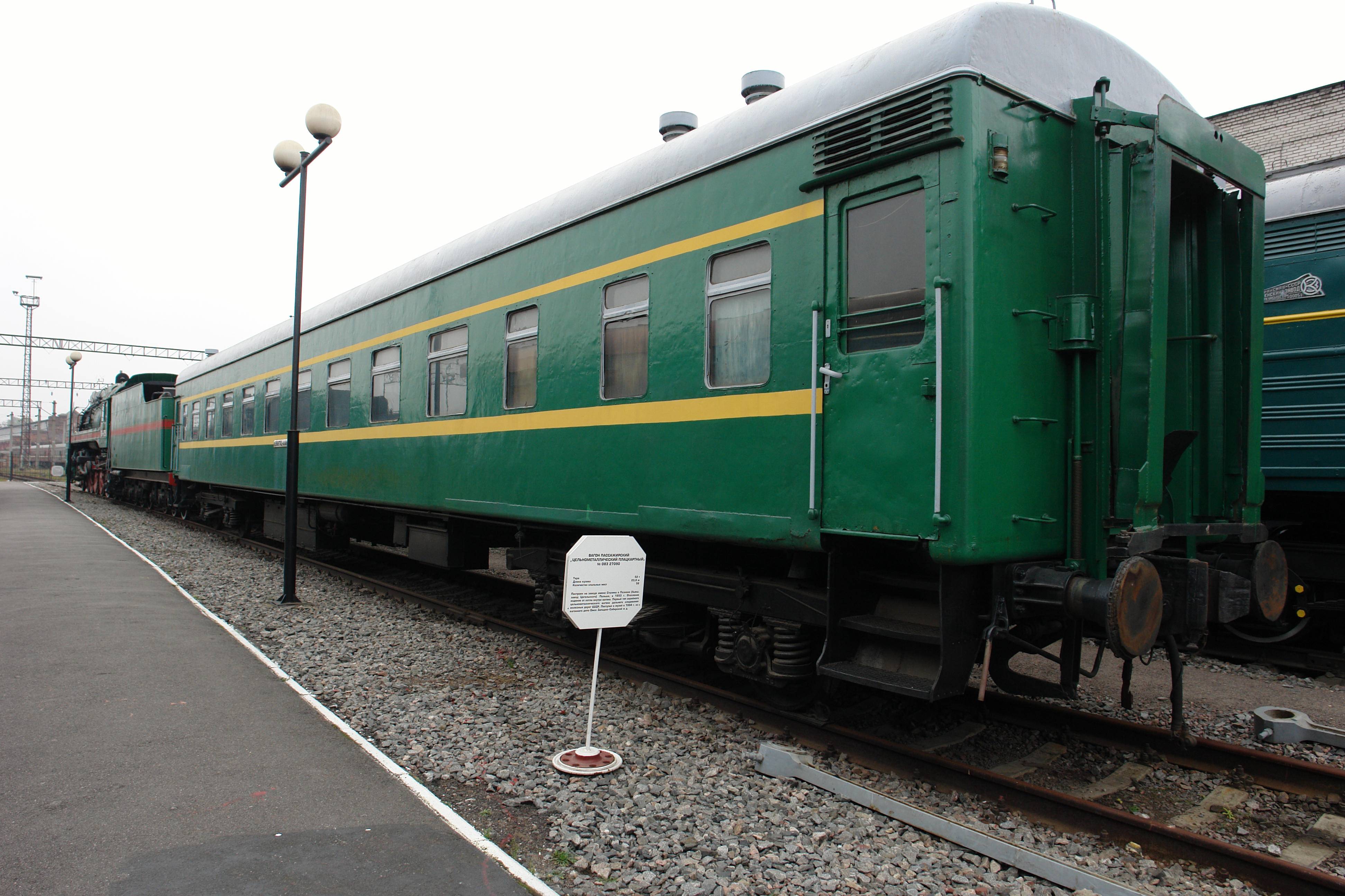 Вагон пассажирский цельнометаллический плацкартный № 083 27090 Тара52 тДлина кузова23,6 мКоличество спальных мест56 Построен на заводе имени Сталина в Познани (бывш. завод Цегельского) Польша, в 1953 г. Отопление водяное от котла внутри вагона. Первый тип серийного цельнометаллического вагона дальнего следования железных дорог СССР. Поступил в музей в 1994 г. из вагонного депо Омск Западно-Сибирской ж д. Музей железнодорожной техники, Санкт-Петербург